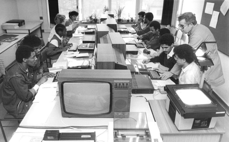 Leipzig, Unterricht für Gaststudenten ADN-ZB Grubitzsch 30.1.89 Leipzig: Herder-Institut - Bestandteil des Mathematikunterrichts am Herder-Institut der Karl-Marx-Universität ist die Ausbildung am Computer. Zweimal wöchentlich lernen vor allem die ausländischen Studenten, die sich auf ein medizinisches, landwirtschaftliches, ökonomisches und technisch-naturwissenschaftliches Studium vorbereiten, die Grundlagen für den Umgang mit dem Computer kennen. Diesen Unterricht erteilt Helmut Stolba, Lehrer im Hochschuldienst. (siehe 9 N)